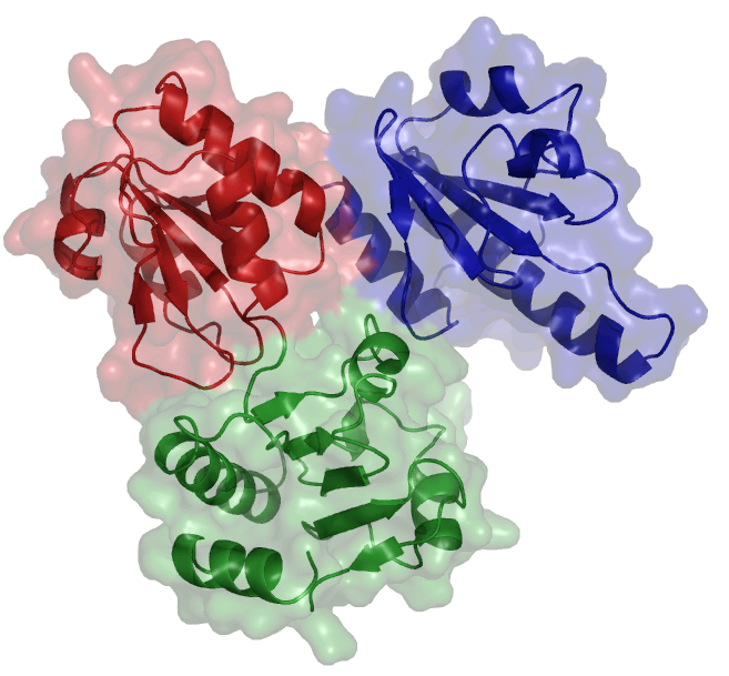 Calsequestrin aus schnell-kontrahierenden Skelettmuskelfasern